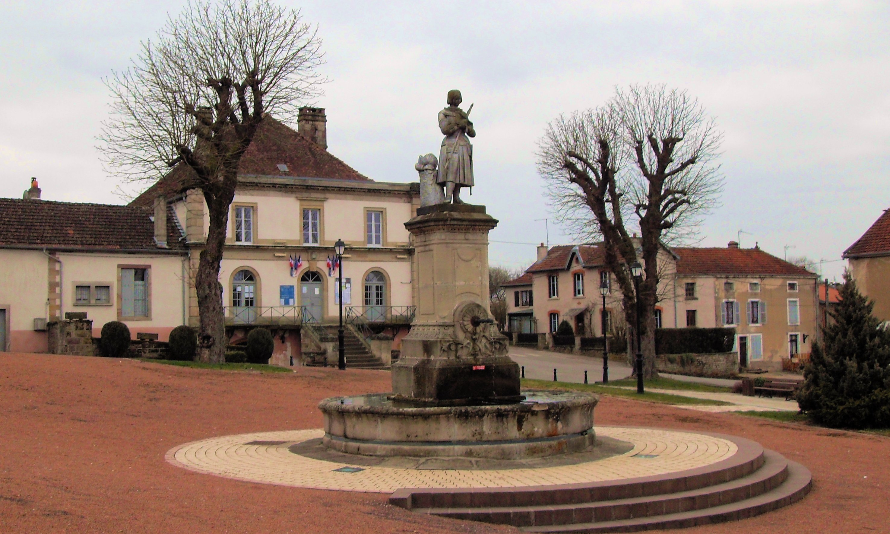 La place de Jeanne-d'Arc et la mairie de Passavant-la-Rochère